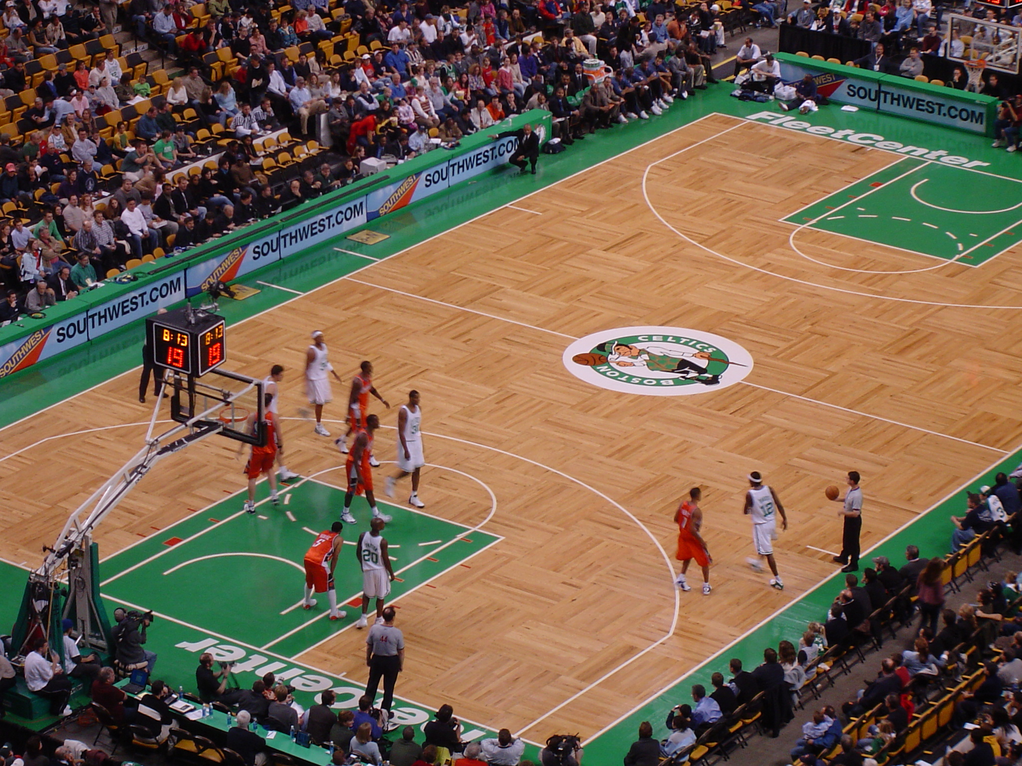 Les Celtics contre les Charlotte Bobcats sur le parquet du TD Garden. Le parquet du TD Garden, théâtre des exploits des Boston Celtics couronnés à 17 reprises champions NBA, dont 8 consécutivement.Celtics Game